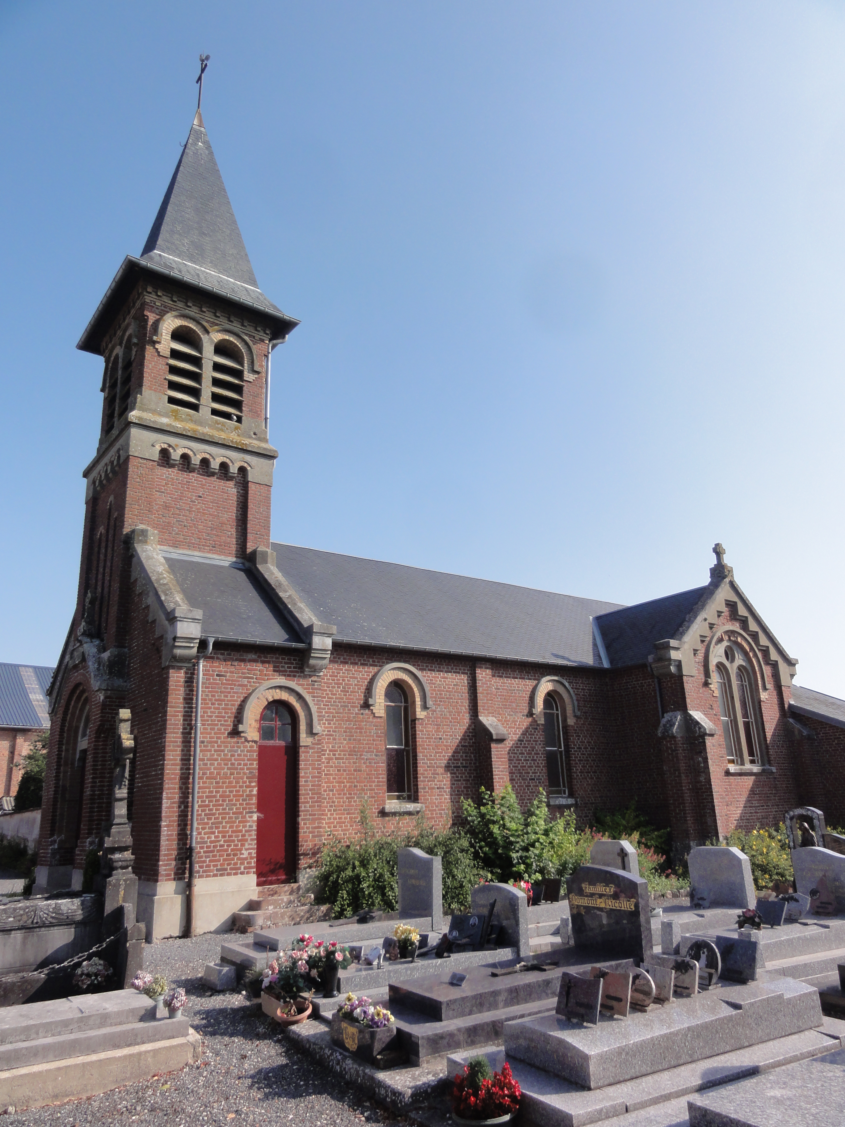 Marcy (Aisne) église